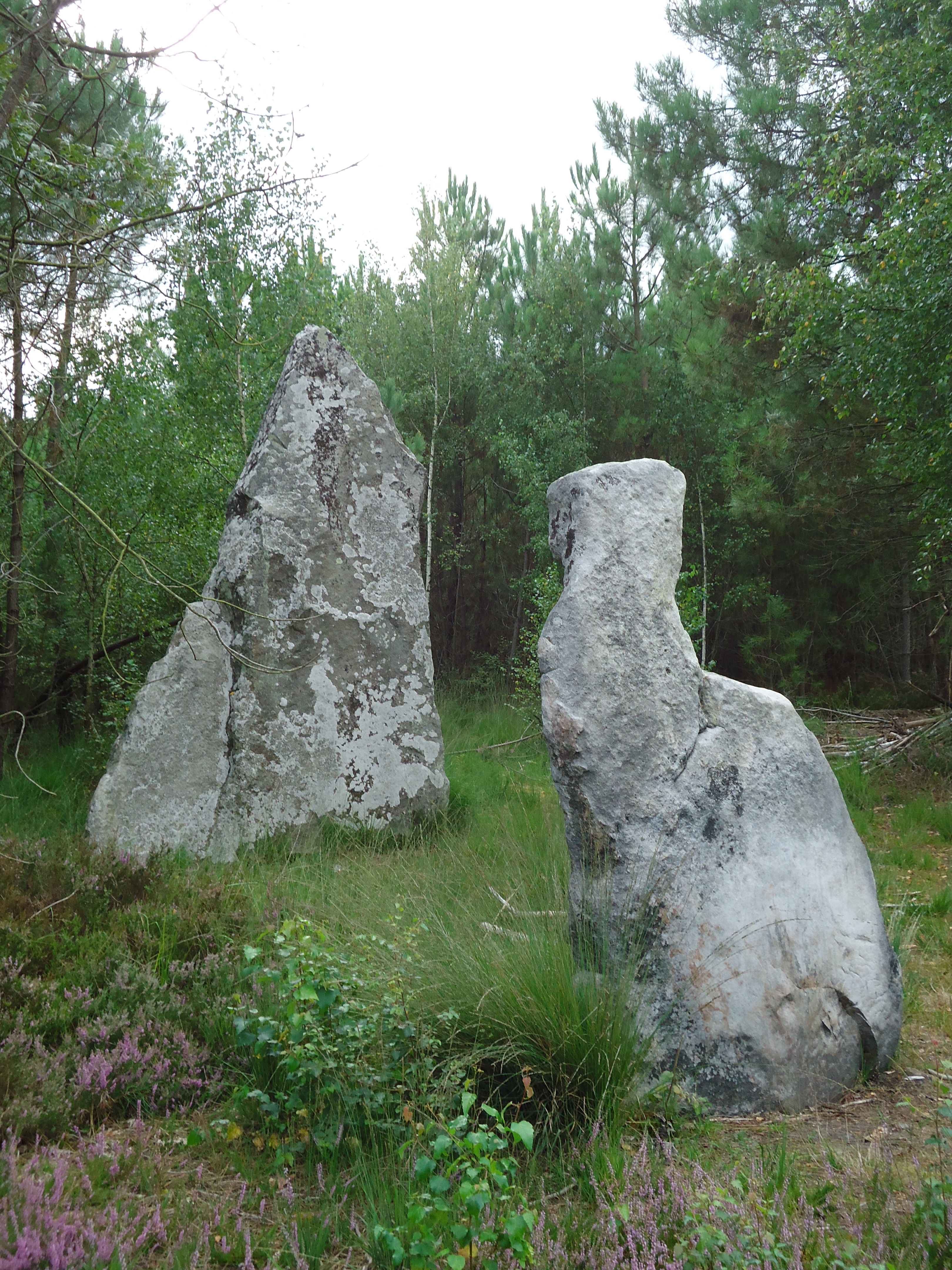 Menhirs de la Mère et la Fille - Saint-Jean-de-la-Motte - Sarthe (72)